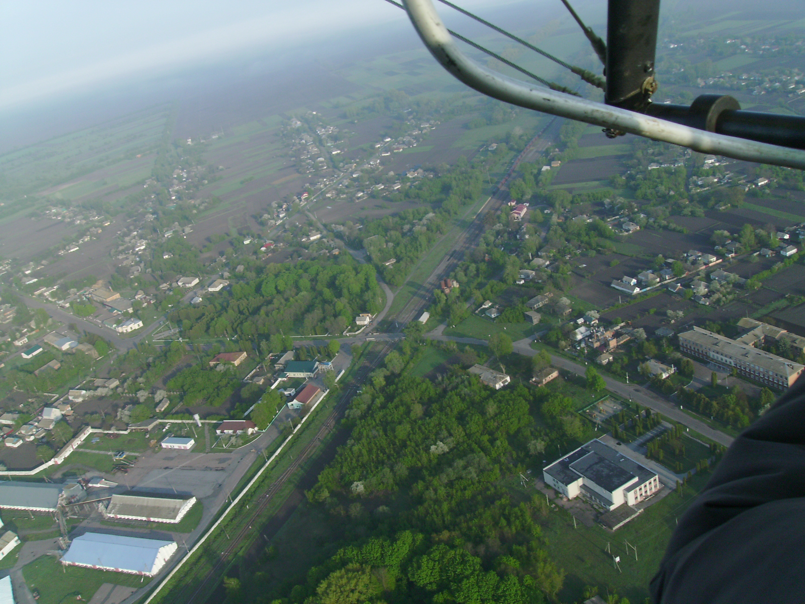 Школа - клуб, с/рада